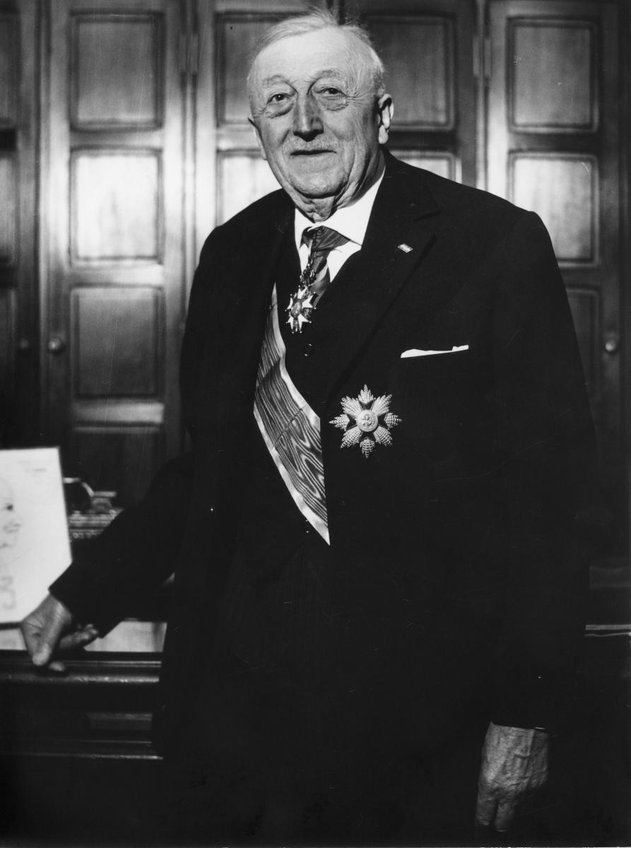 Francois Hébrard, président de la FSCF et de la FICEP